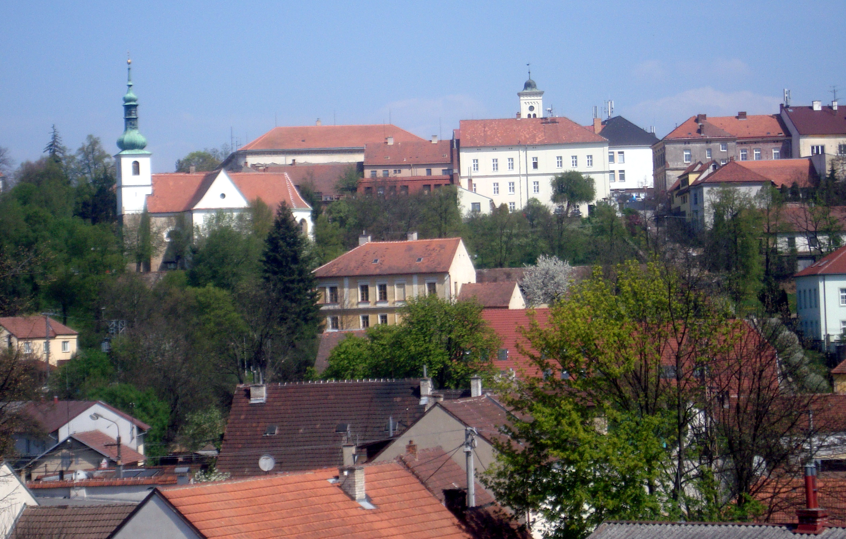 Zleva: chrám sv. Martina níže vpravo římskokatolická fara, dále vpravo nahoře radnice